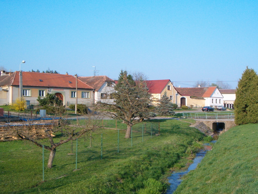 Náves ve Vnorovicích